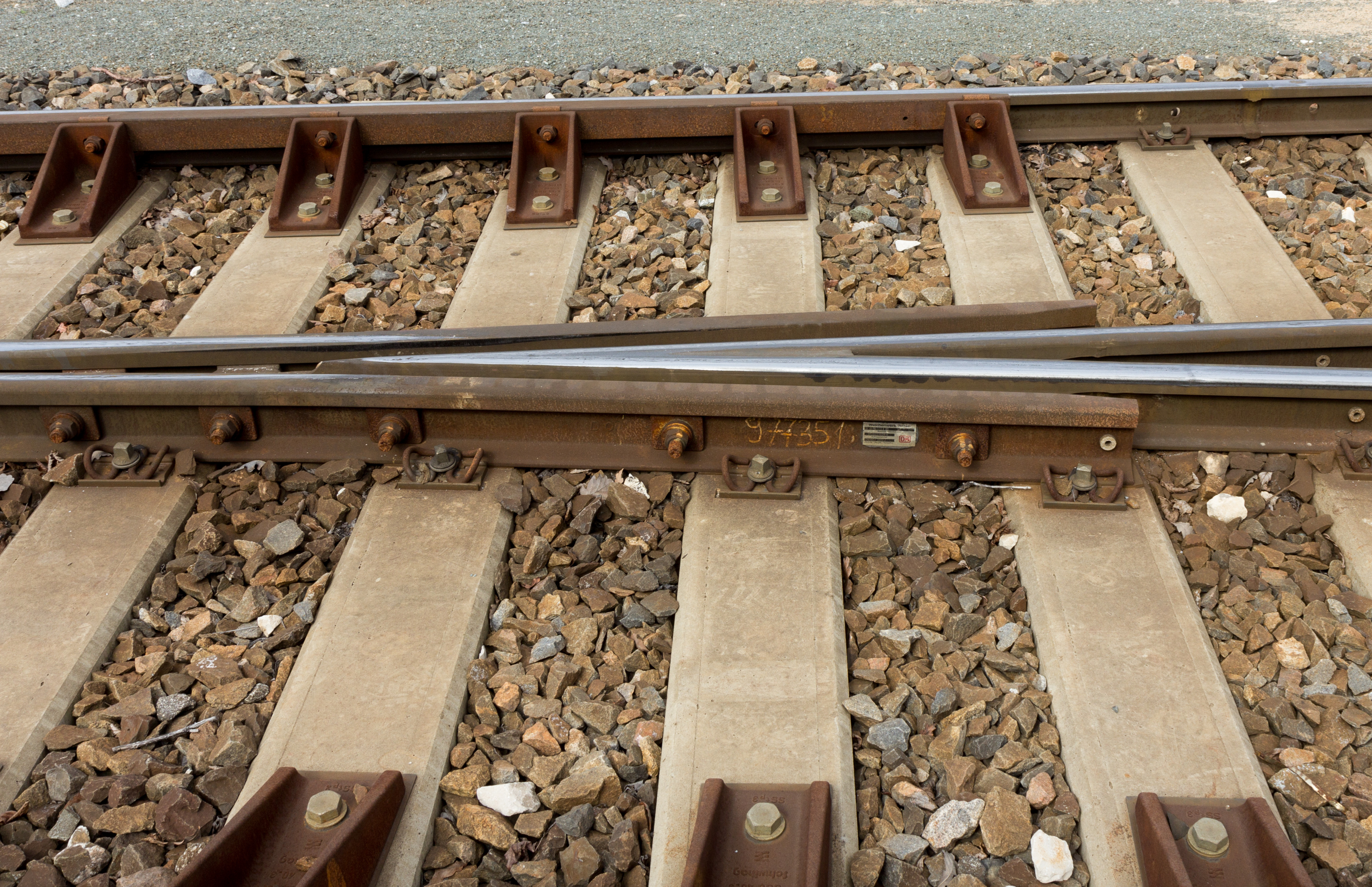 Nürnberg-Südbahnhof Herzstück einer Weiche (Schienenbau).